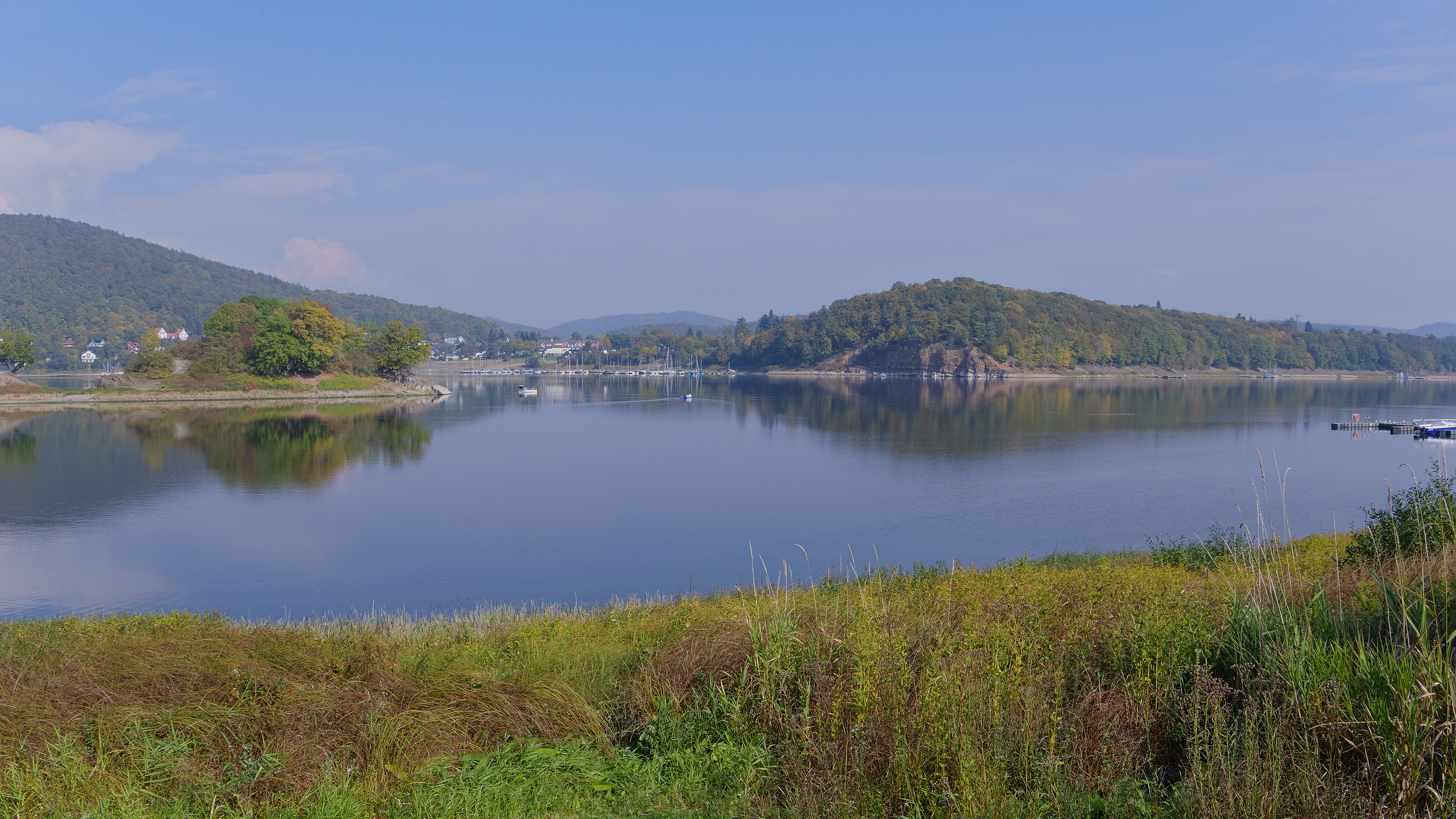 Blick von Bringhausen über den Edersee und die Liebesinsel (links) auf die Halbinsel Scheid. Aufgenommen in Edertal-Bringhausen, Hessen, Deutschland.